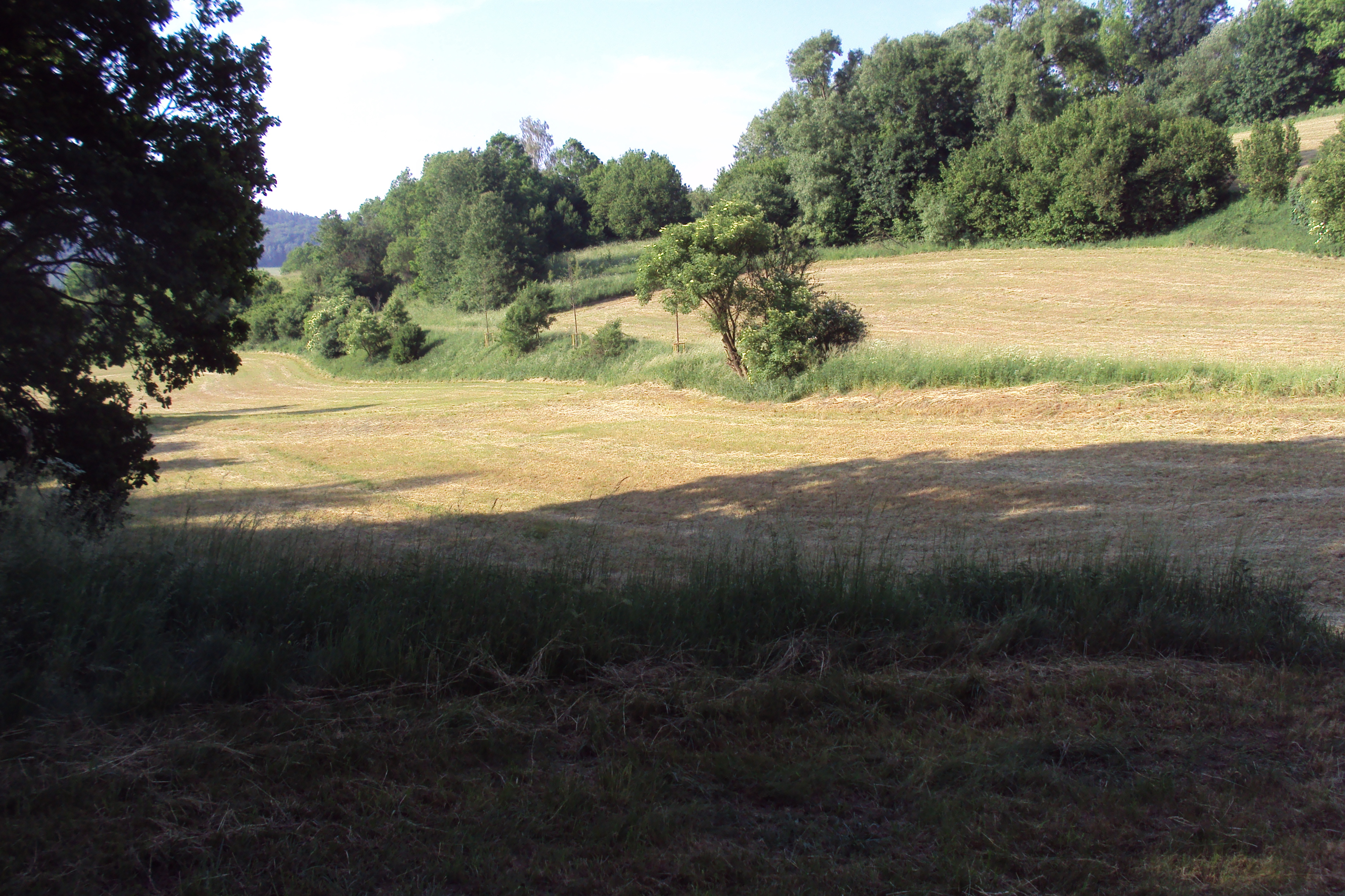 Přírodní památka Deštenské pastviny